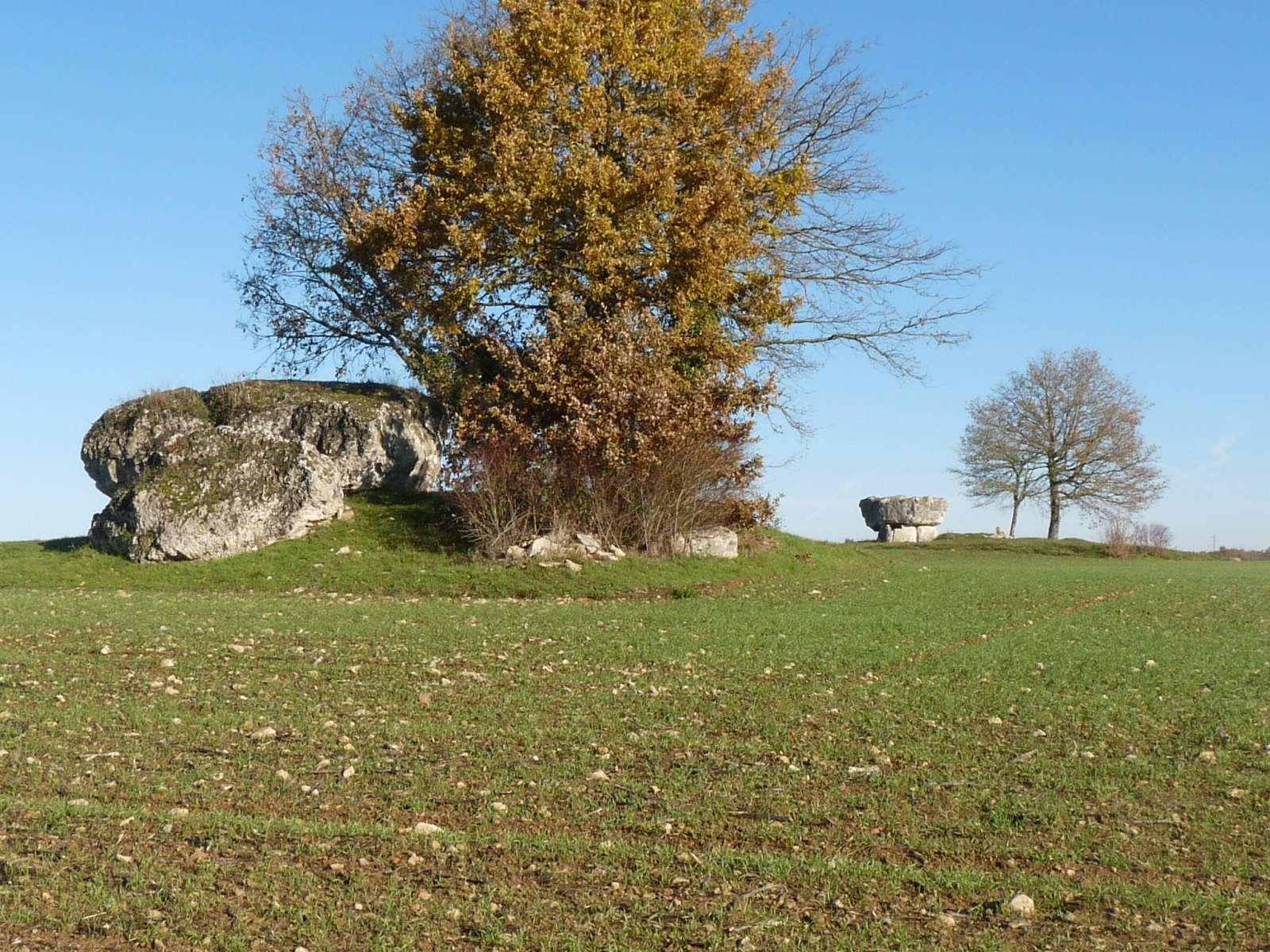 dolmen de la Grande Pérotte, Fontenille, Charente, France